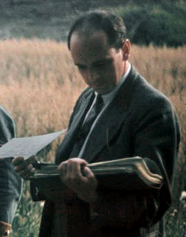 Dr. Robert Ritter mit Aktenmappe. Cropped version